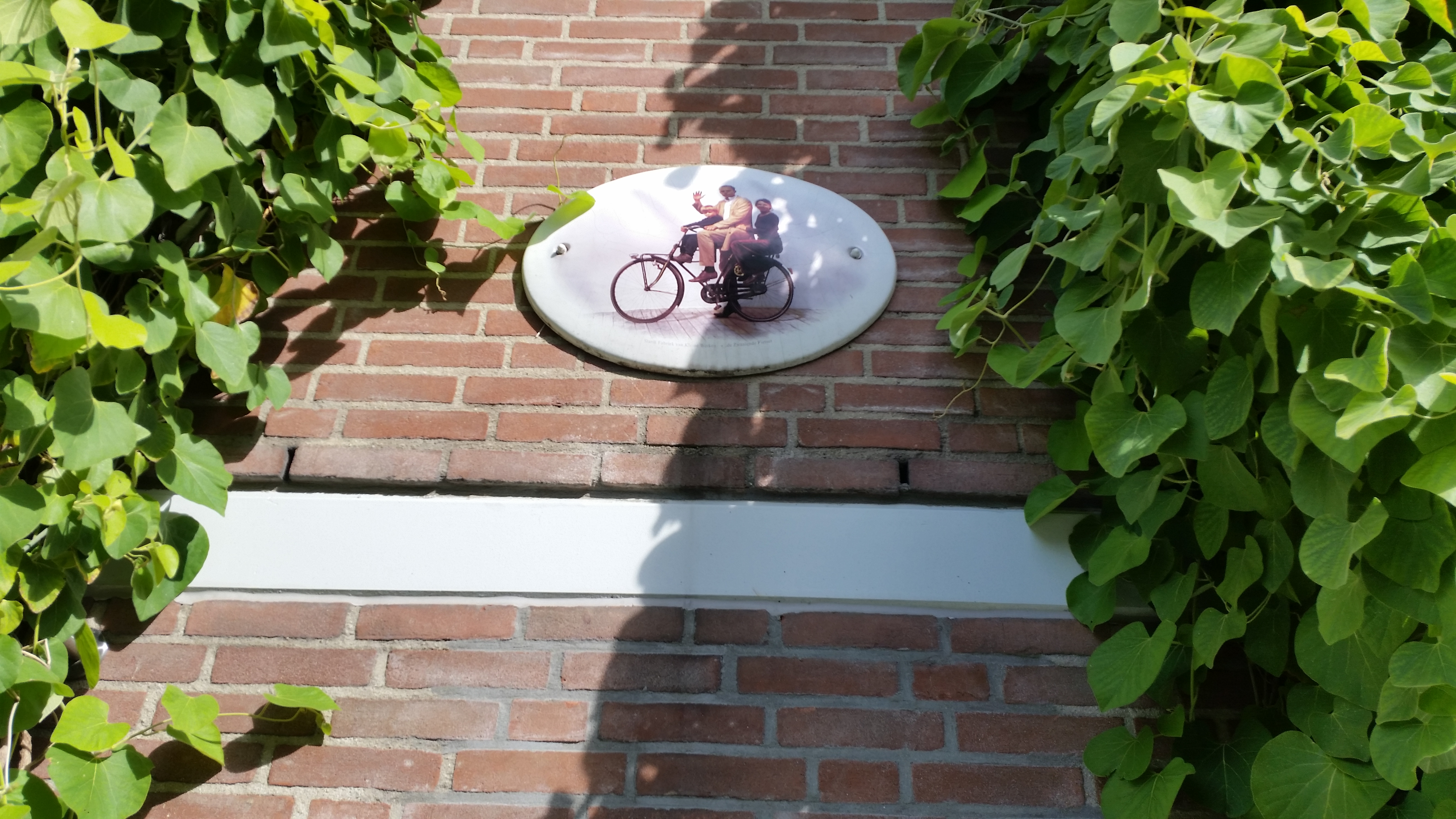 Een versie van De zwaaiende fietser; van oorsprong zestien keramische tegels voor een fietsroute door de Spaarndammerbuurt; kunstenaar F. Starik. Deze is geplaatst aan de Van Noordtkade